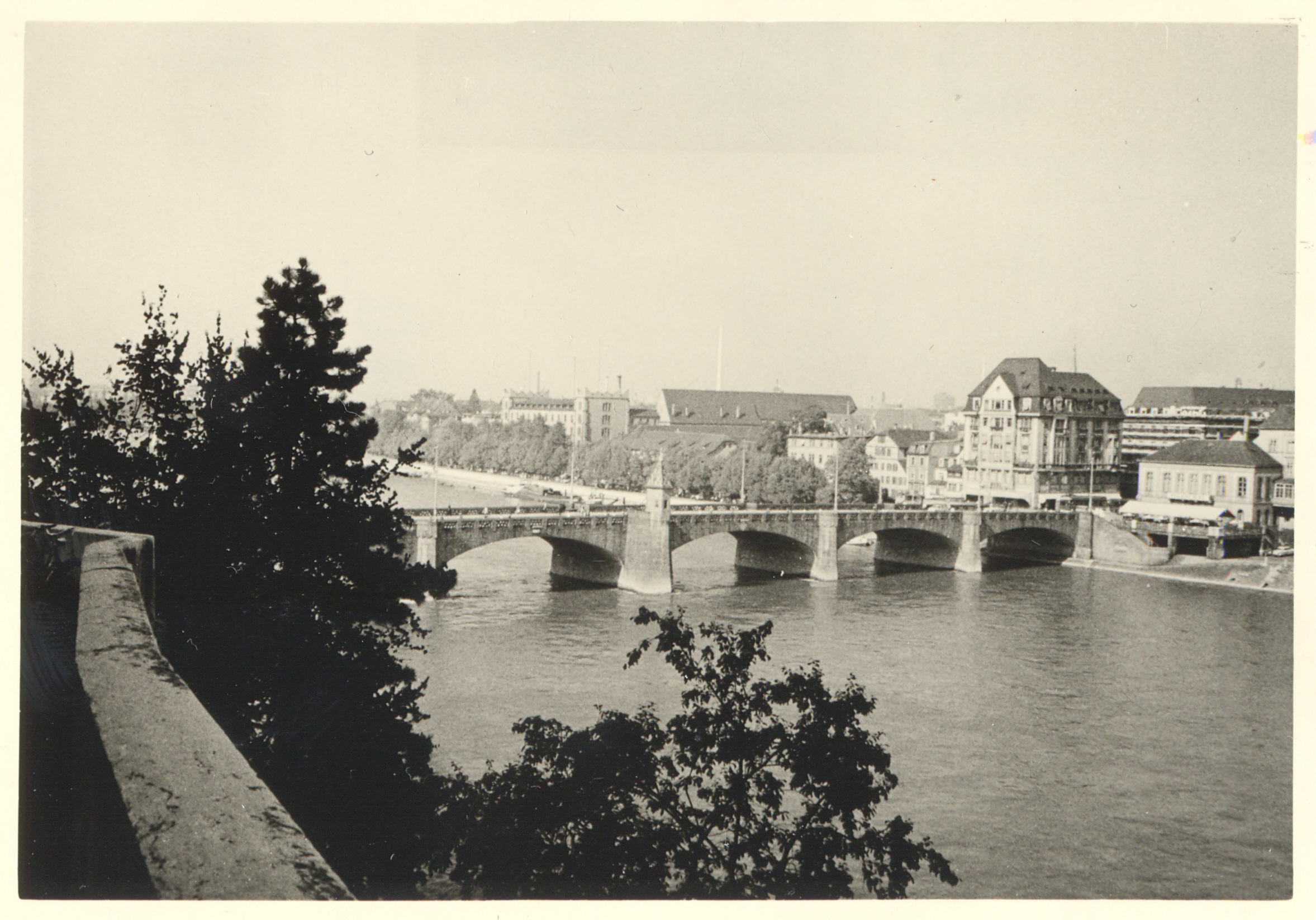 Basel, Mittlere Brücke, ohne Jahresangabe